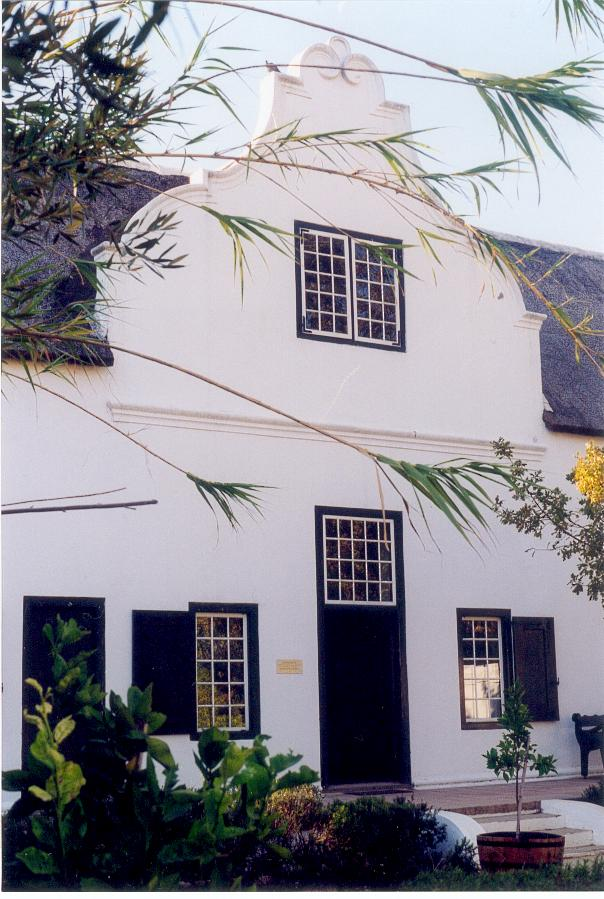 Gevel in Kaaps-Hollandse stijl, aan de Dorpsstraat in Stellenbosch, Zuid-Afrika. (foto: Dbruinsma 9 mrt 2005 11:55 (CET))